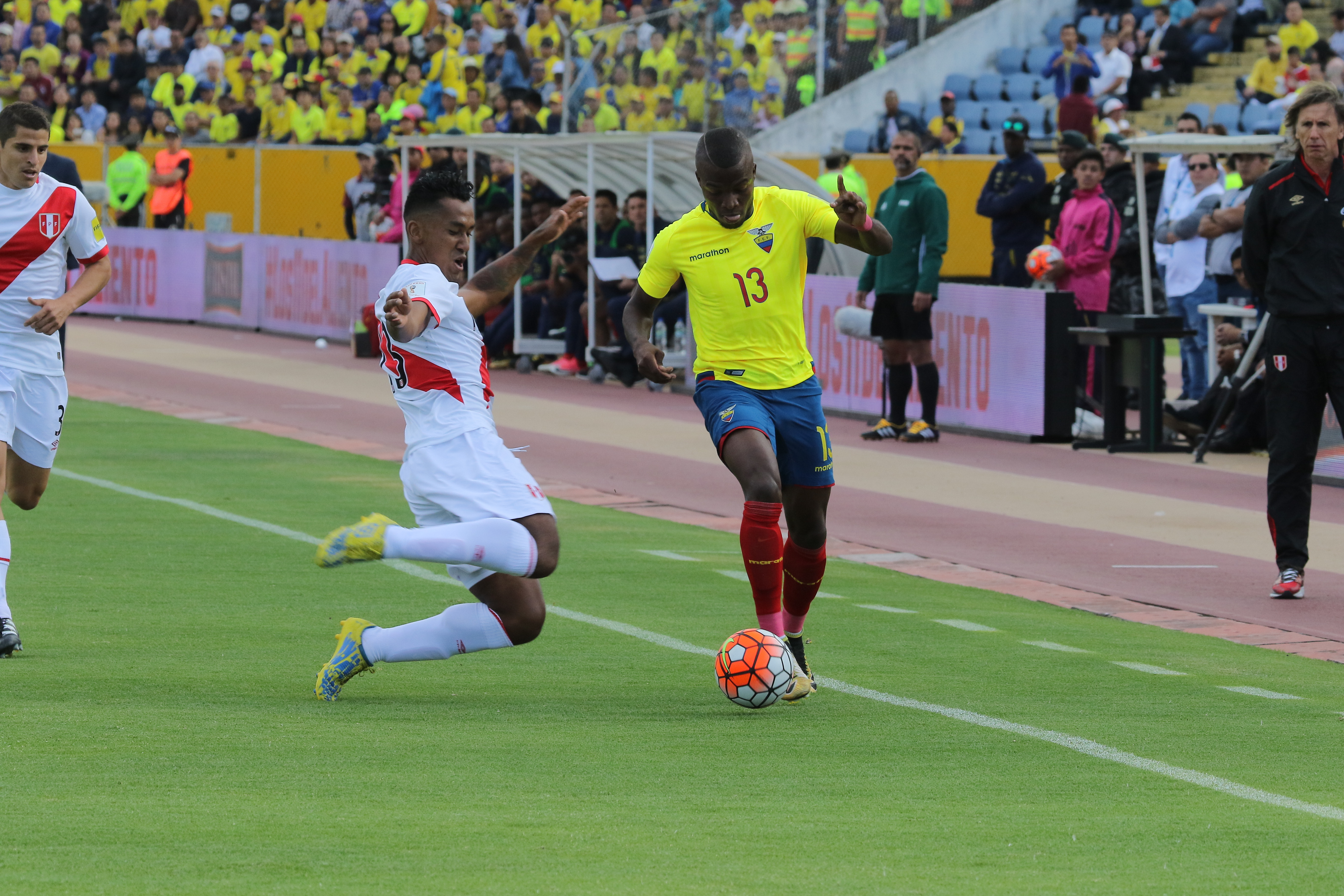 Quito 5 Sep (Andes).- Encuentro por eliminatorias Rusia 2018 entre Ecuador y Perú. Fotografías: Carlos Rodríguez/Andes.